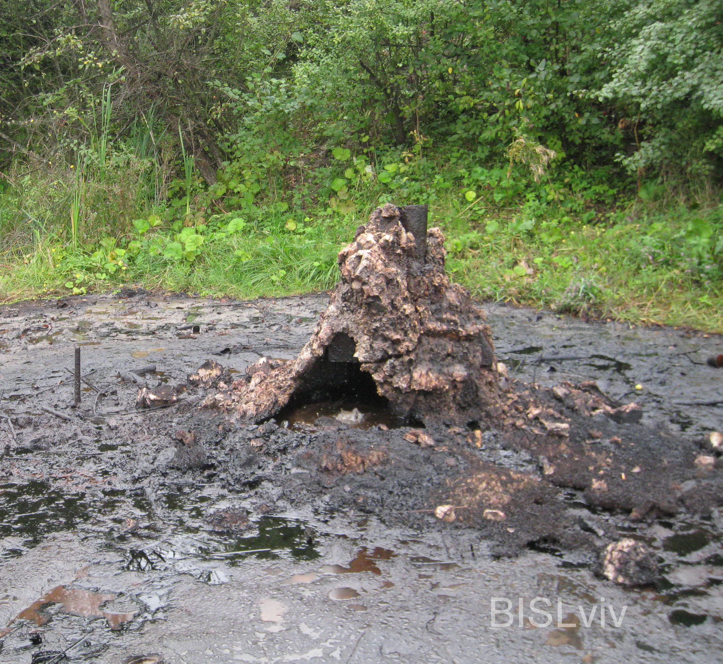 «Старуня»